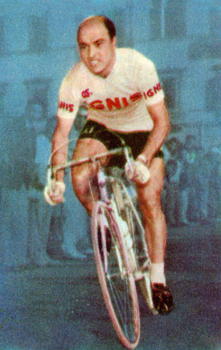 Figurina/Sticker CAMPIONI DELLO SPORT 1967/68-n.291 - M. POBLET